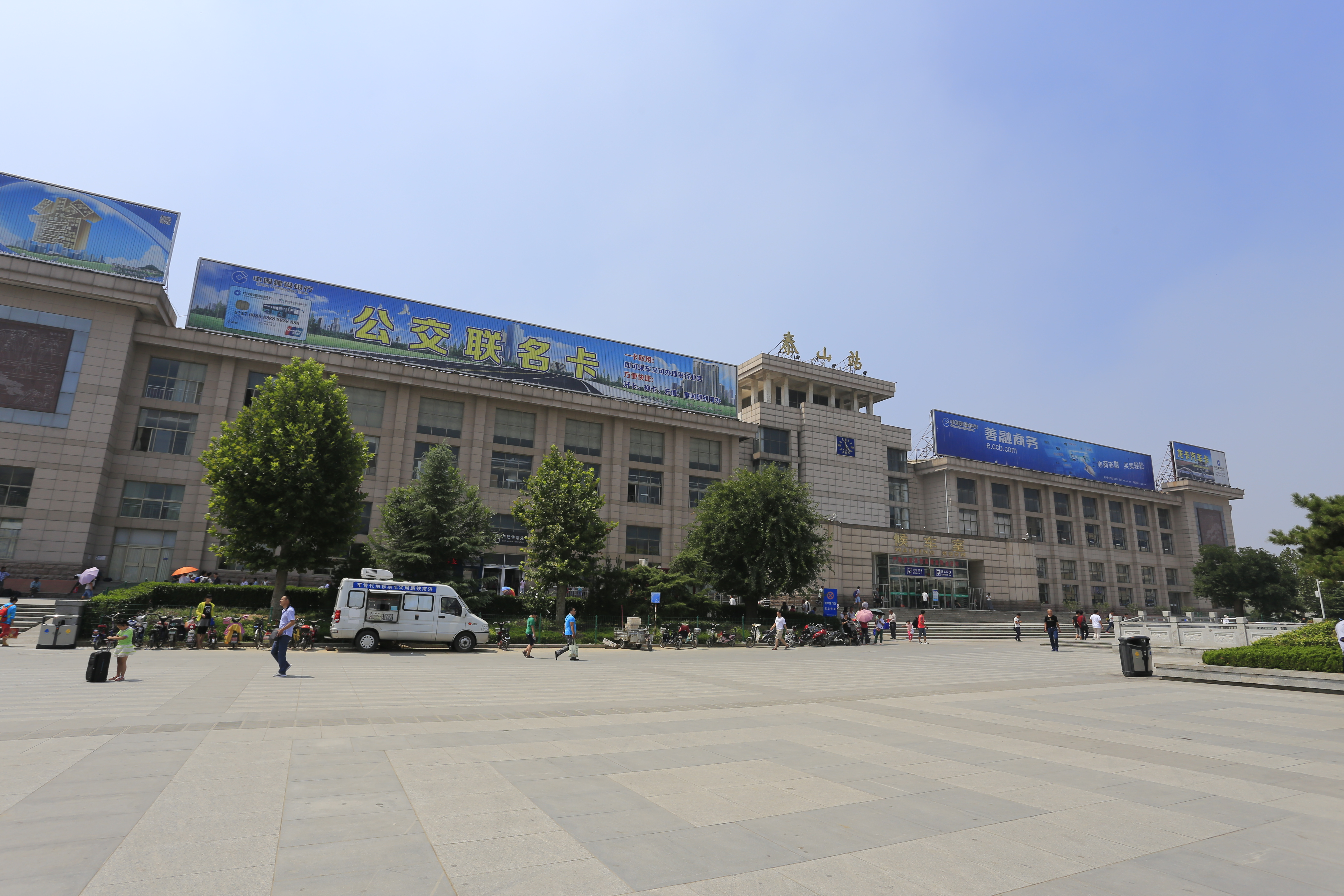 泰山站 (泰安)